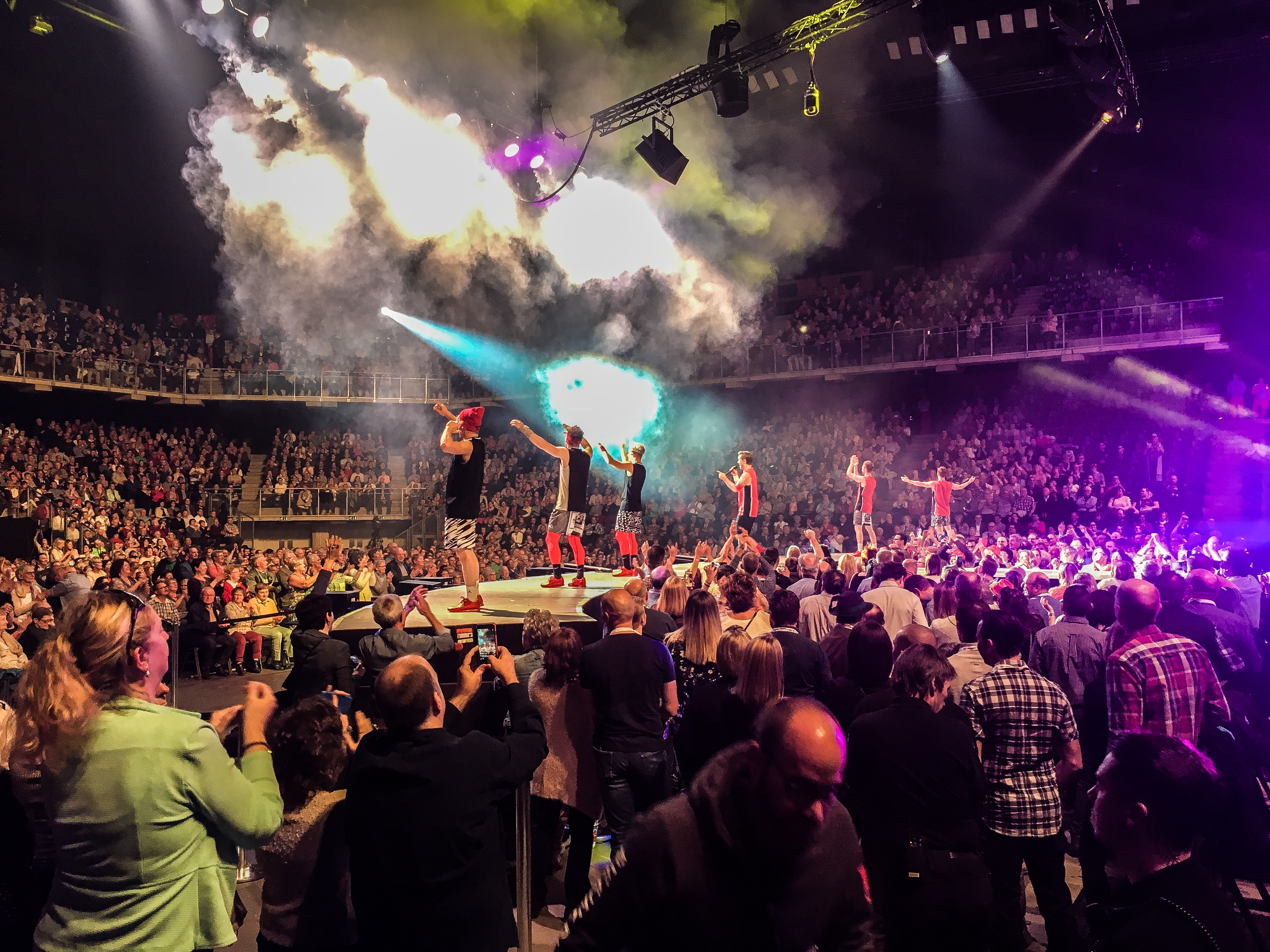 DDC auf Tournee